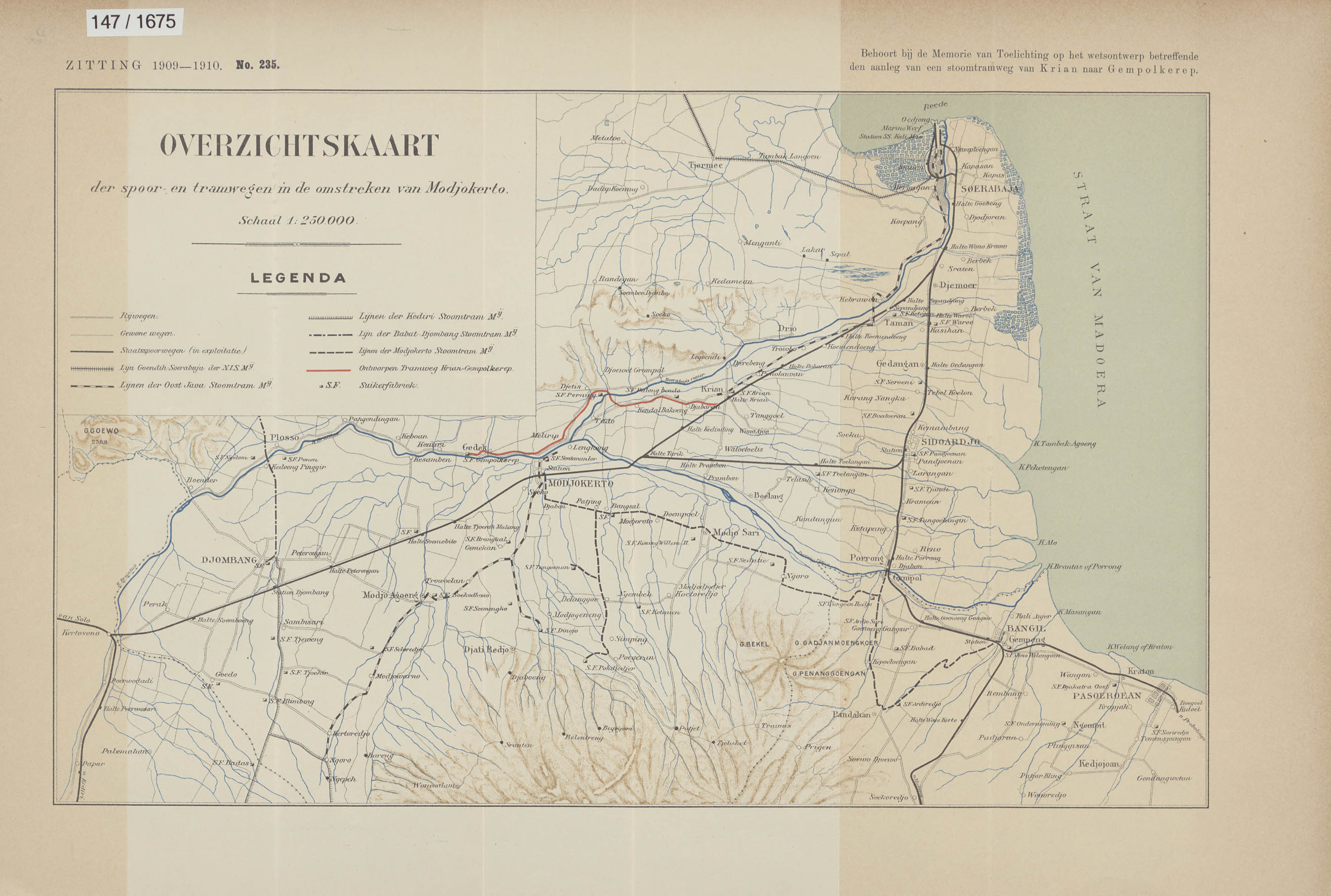 In 1906 werd een voorontwerp ingediend voor het maken van een zijlijn van de staatsspoorweg naar de suikerfabriek Gempolkerek. Werd in 1906 gedacht aan een lijn die, het station Krian met Gempolkerek verbindende, op enige afstand ten zuiden van de suikerfabriek